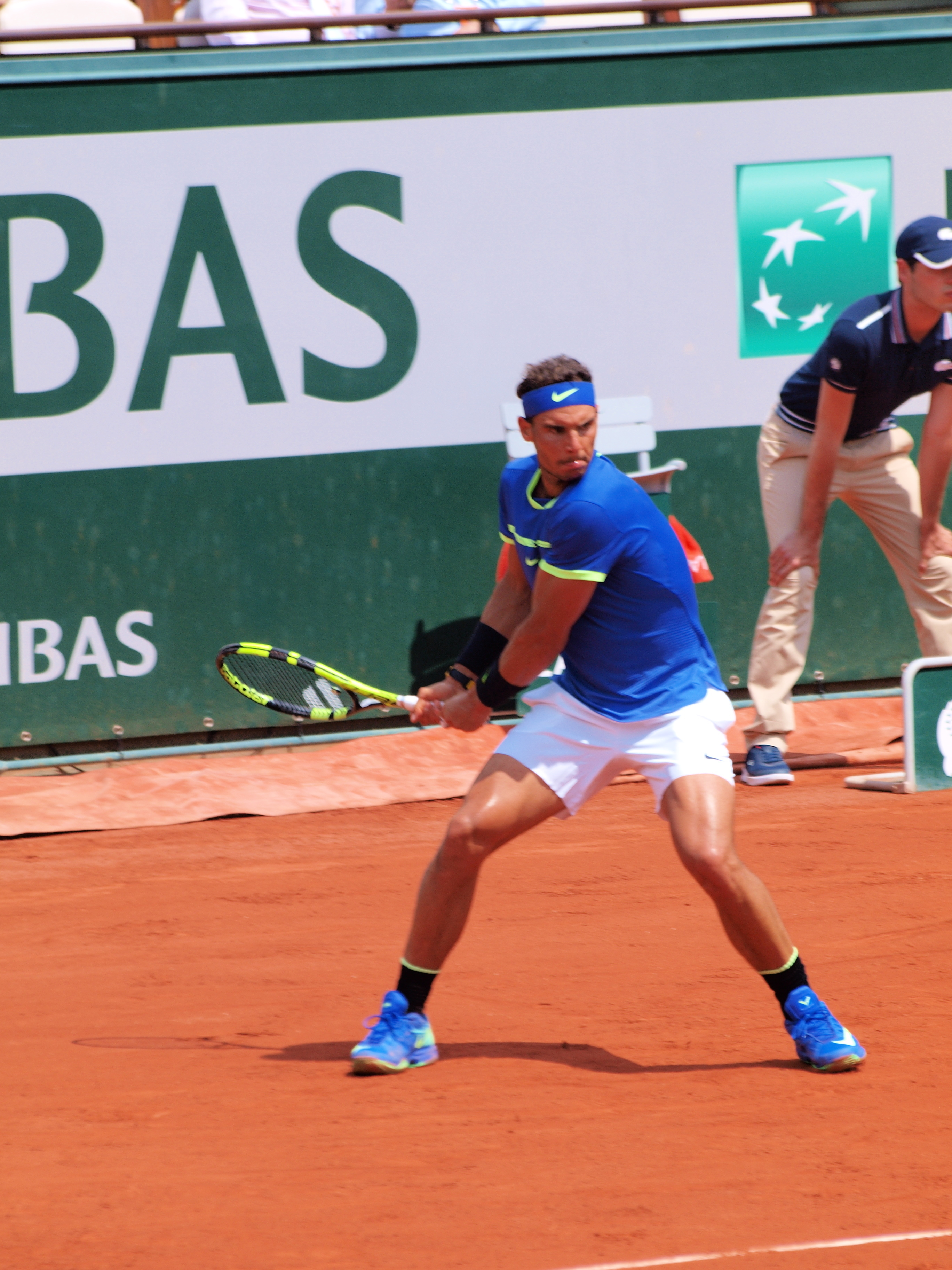 Rafael Nadal lors des Internationaux de France de Tennis au stade Roland Garros de Paris, le 2 juin 2017, durant le match contre Nikoloz Basilashvili.